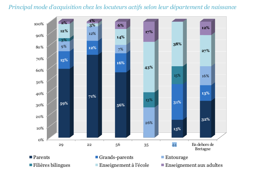 Résultats enquête publique sur la pratique du breton.